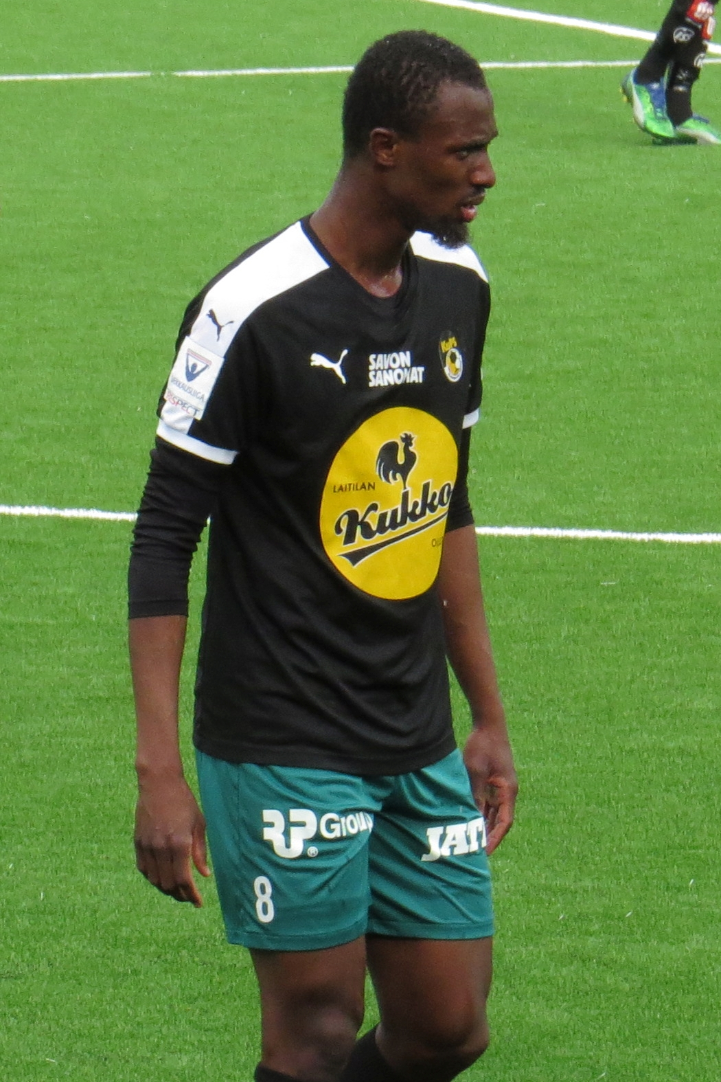 Babacar Diallo, senegalilainen jalkapalloilija Kuopion Palloseuran joukkueessa kaudella 2015.